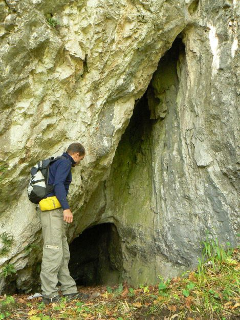 Jaskyňa Úkryt dievčat patrí k skupine jaskýň situovaných v tzv. Hrhovskom amfiteátri. V čase tatárskych vpádov slúžila obyvateľom Hrhova ako refúgium. Prekonala korózny vývoj. Má dĺžku 14 m.